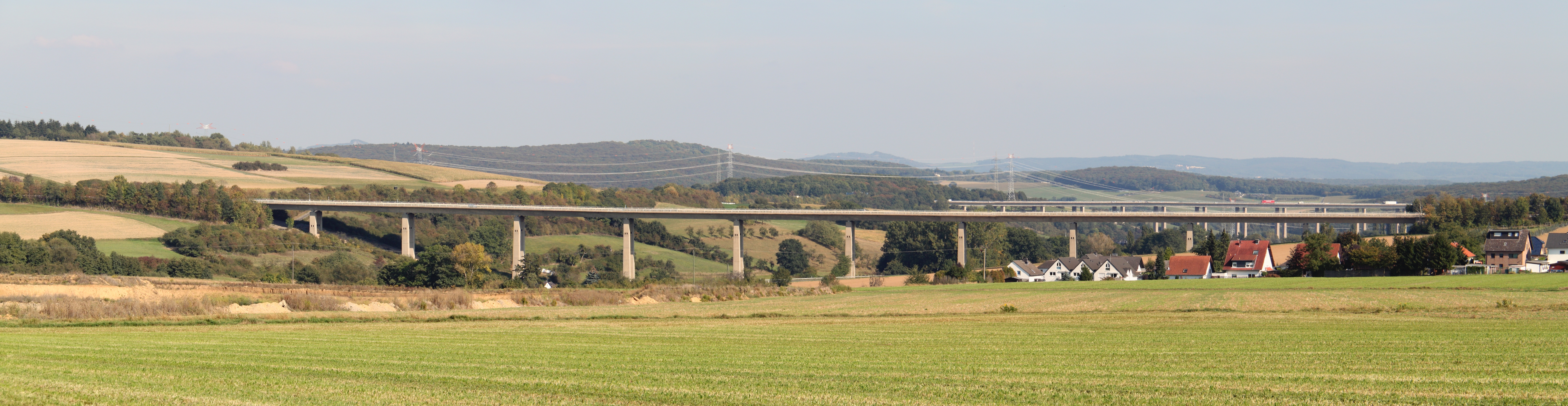 Blick über über das Ahrtal, im Vordergrund die Talbrücke Karweiler (A 573, nach rechts Richtung Bad Neuenahr-Ahrweiler), im Hintergrund die Talbrücke Bengen (A 61), rechts Teile von Karweiler (Landkreis Ahrweiler, Rheinland-Pfalz), Blick vom Ortsausgang Ringen (Gemeinde Grafschaft) an der L83 (Ahrtalstraße) zwischen Ringen und Karweiler, Blickrichtung Osten, zusammengefügt aus drei Einzelbildern, links (nicht im Bild) befindet sich das Autobahndreieck Bad Neuenahr-Ahrweiler